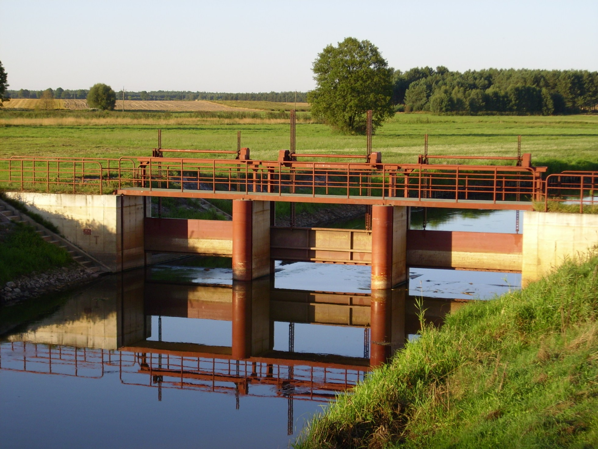 Jaz na Krznie w okolicach miejscowości Puchacze (powiat bialski).